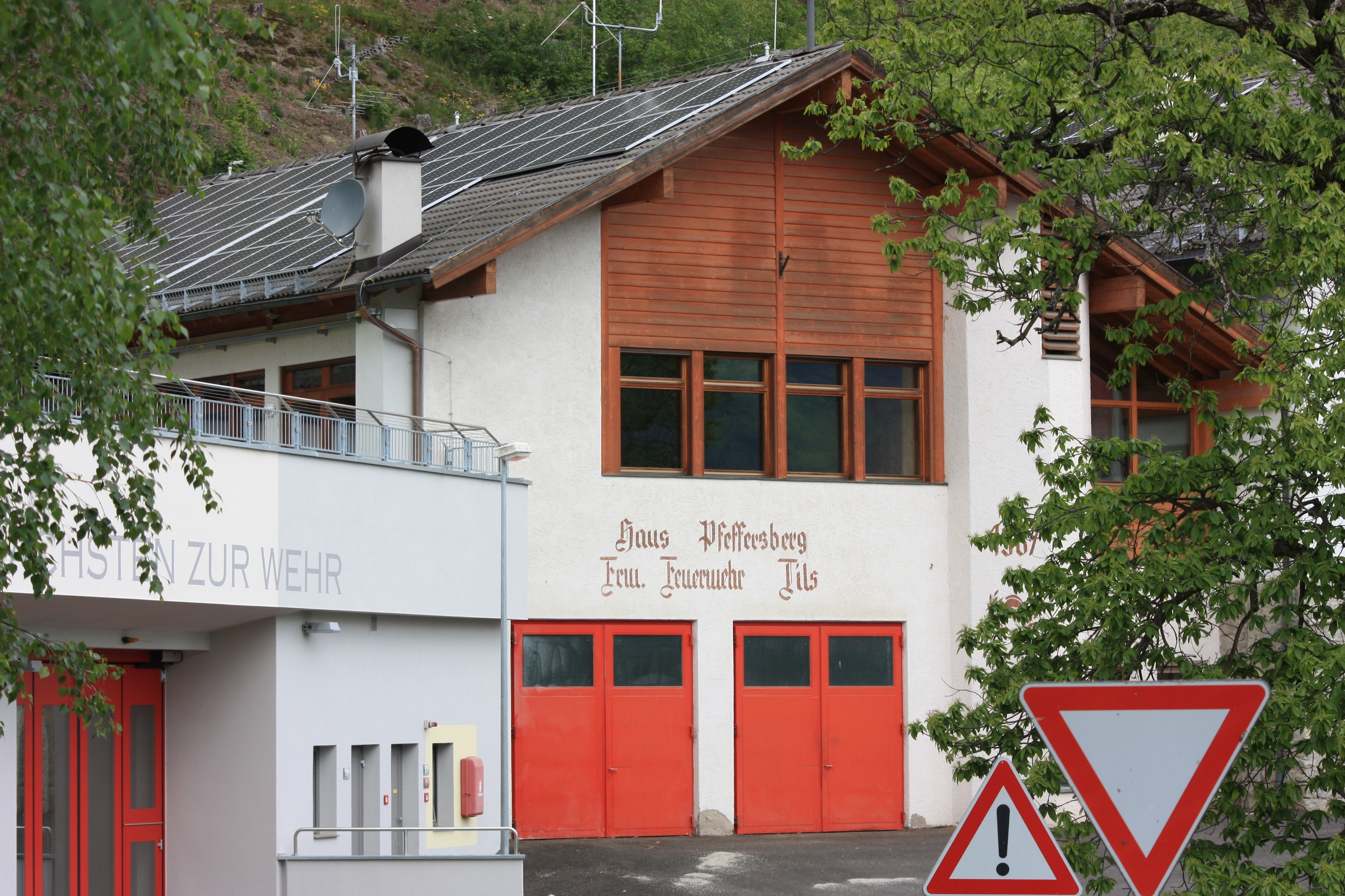 Brixen, Südtirol: Feuerwehrgebäude bei Tils